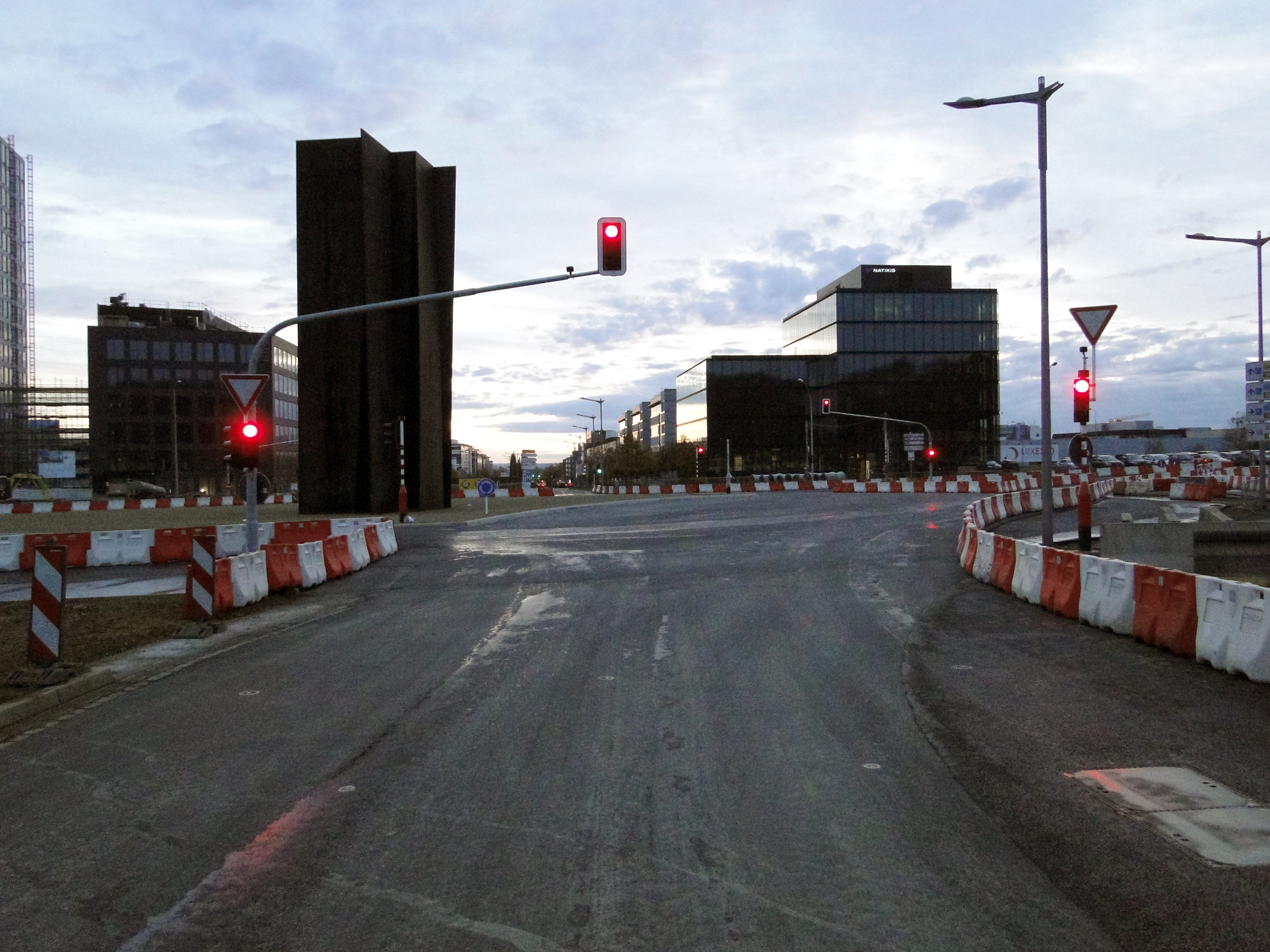 Rond-point Serra: travaux préparatoires pour la mise en service en "rond-point Turbo". Accès rond-point depuis l'autoroute